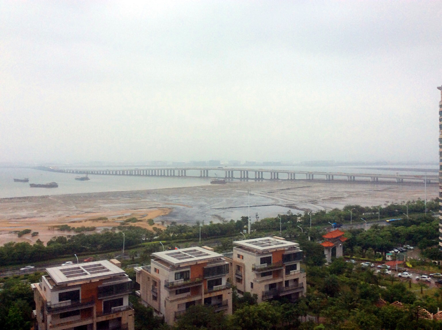 集美大桥全景